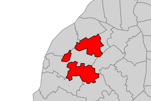 Kaart van de voormalige gemeente Tjum